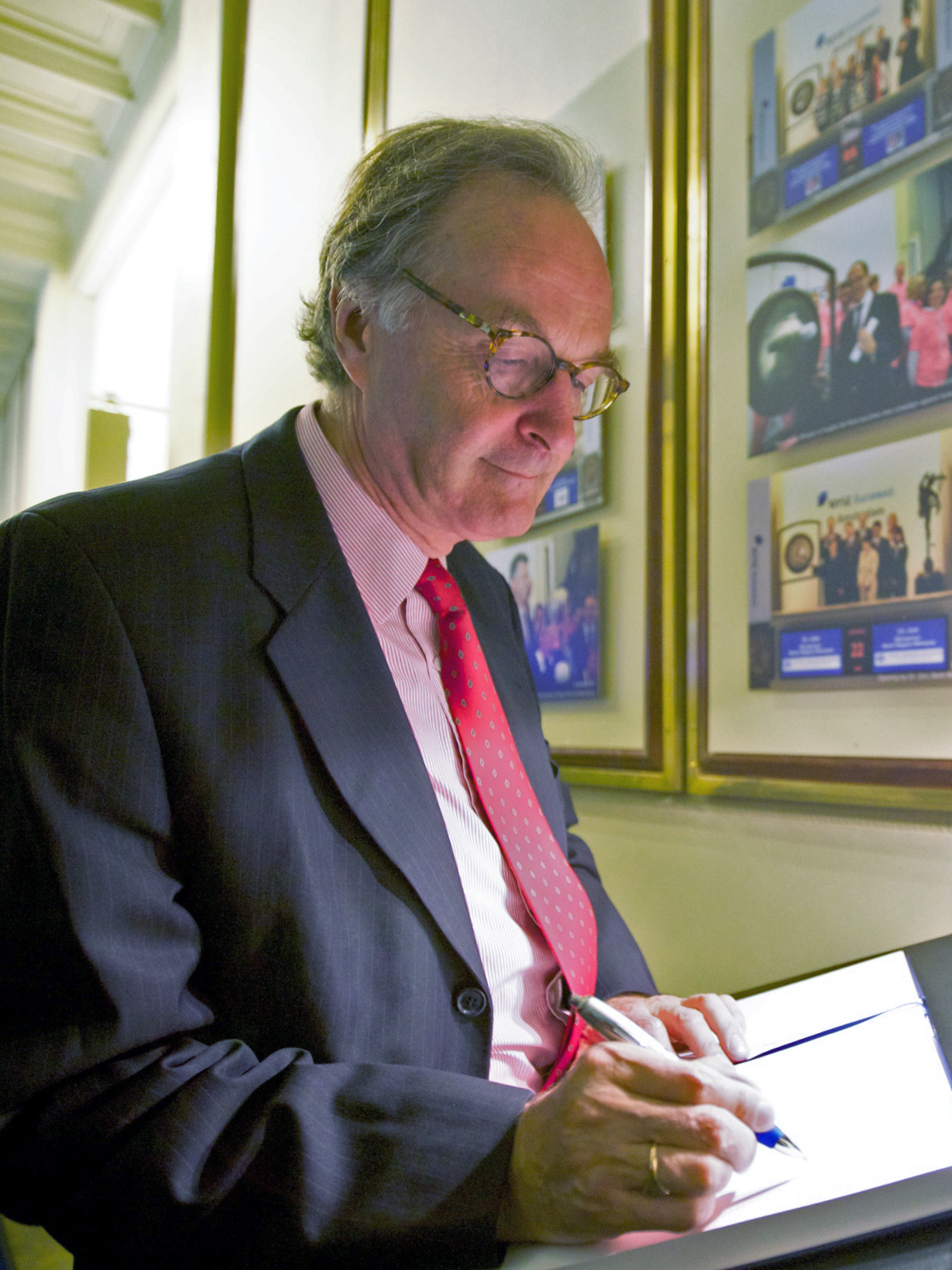 Opening handelsdag Amsterdamse Beurs op de Wereldalfabetiseringsdag